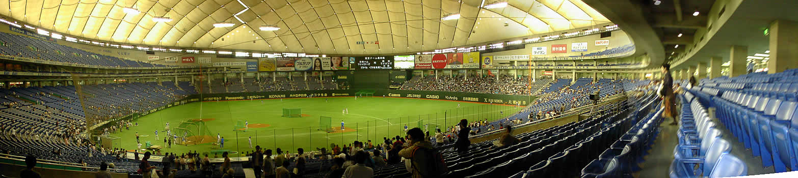 東京ドーム(2003年9月28日東京ファイターズ最終試合)投稿者により撮影されました。 2005年8月14日 (日) 14:56 . . Gomurafuji . . 1,566×350 (121 キロバイト)